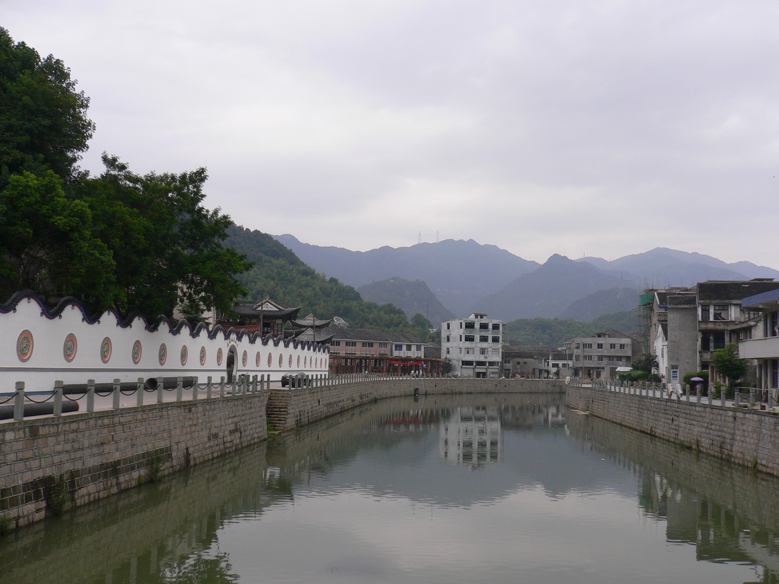 山清水秀瞿溪河